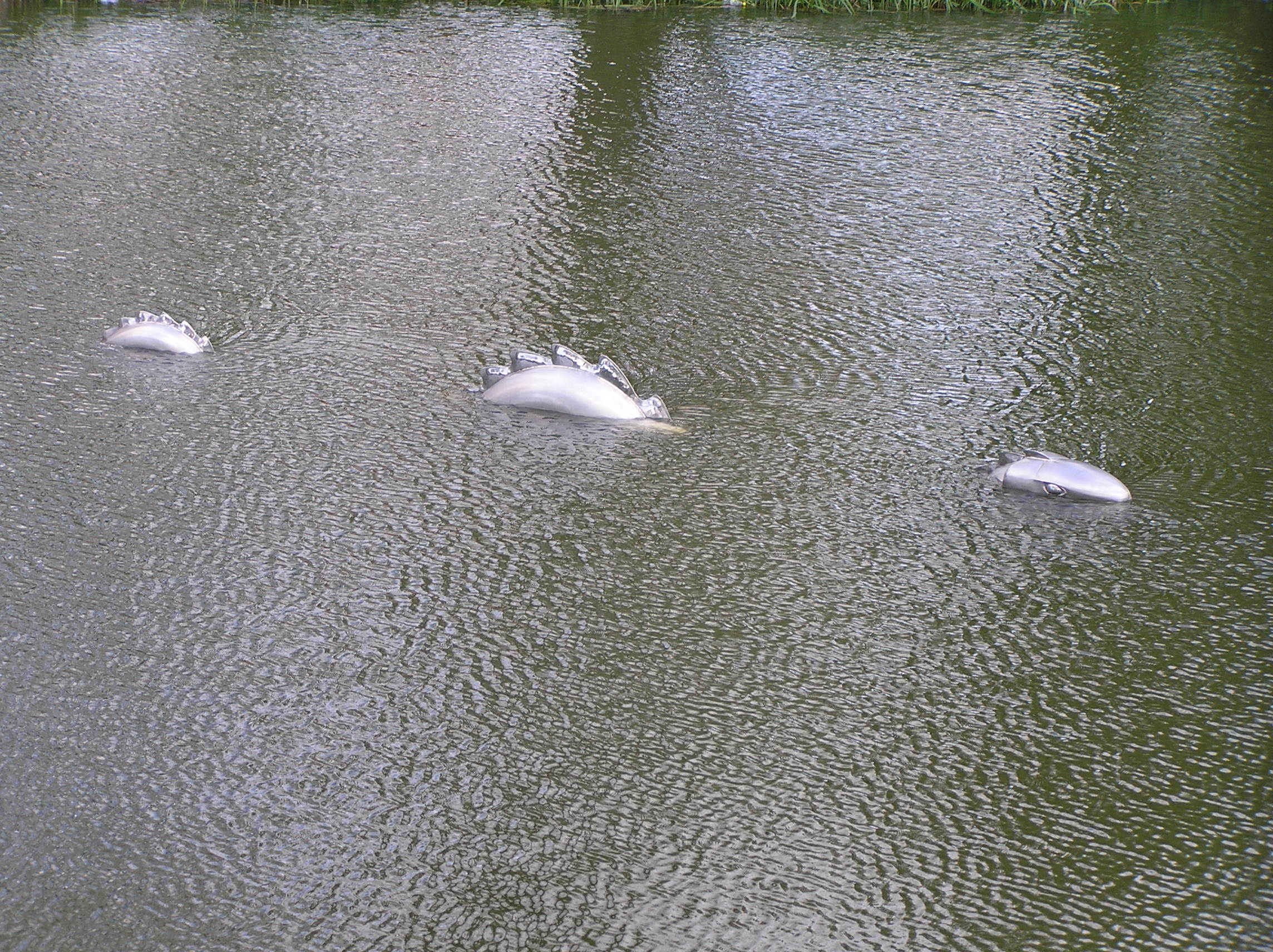 "Vessie" door Wilco Traas. Kunstwerk in de Veste (singel) van Goes ter hoogte van de Jacob Valckestraat.